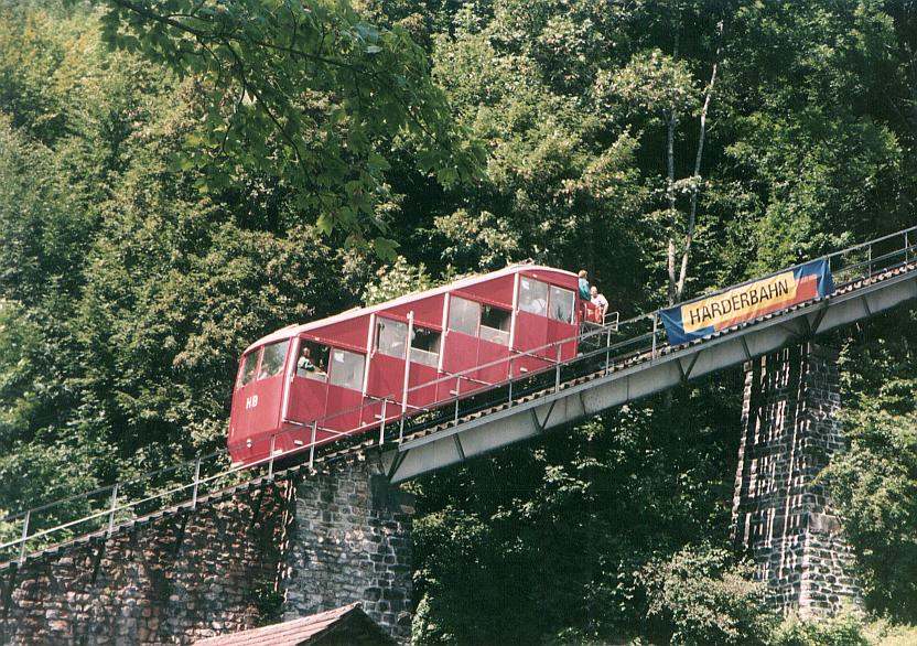 Description